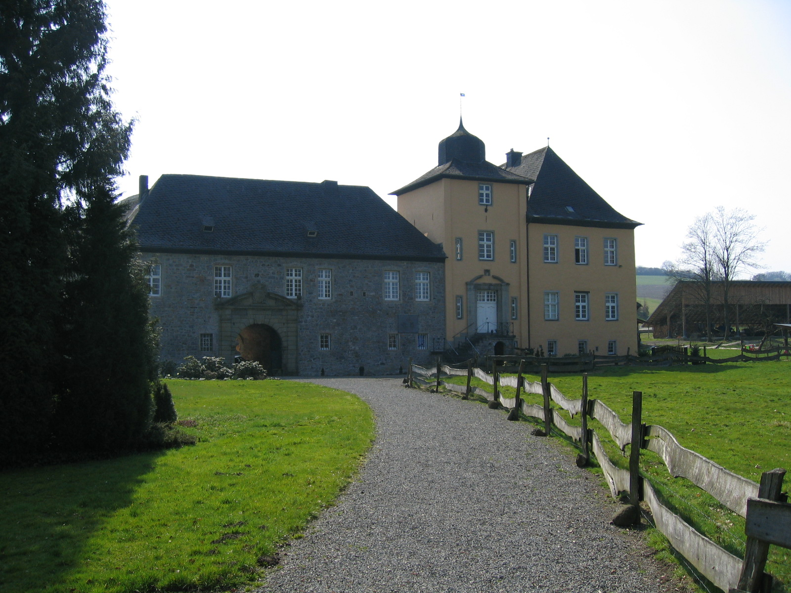 Ehemaliges Schloss Amecke der Freiherren von Wrede-Amecke (Privatbesitz) in Sundern-Amecke.